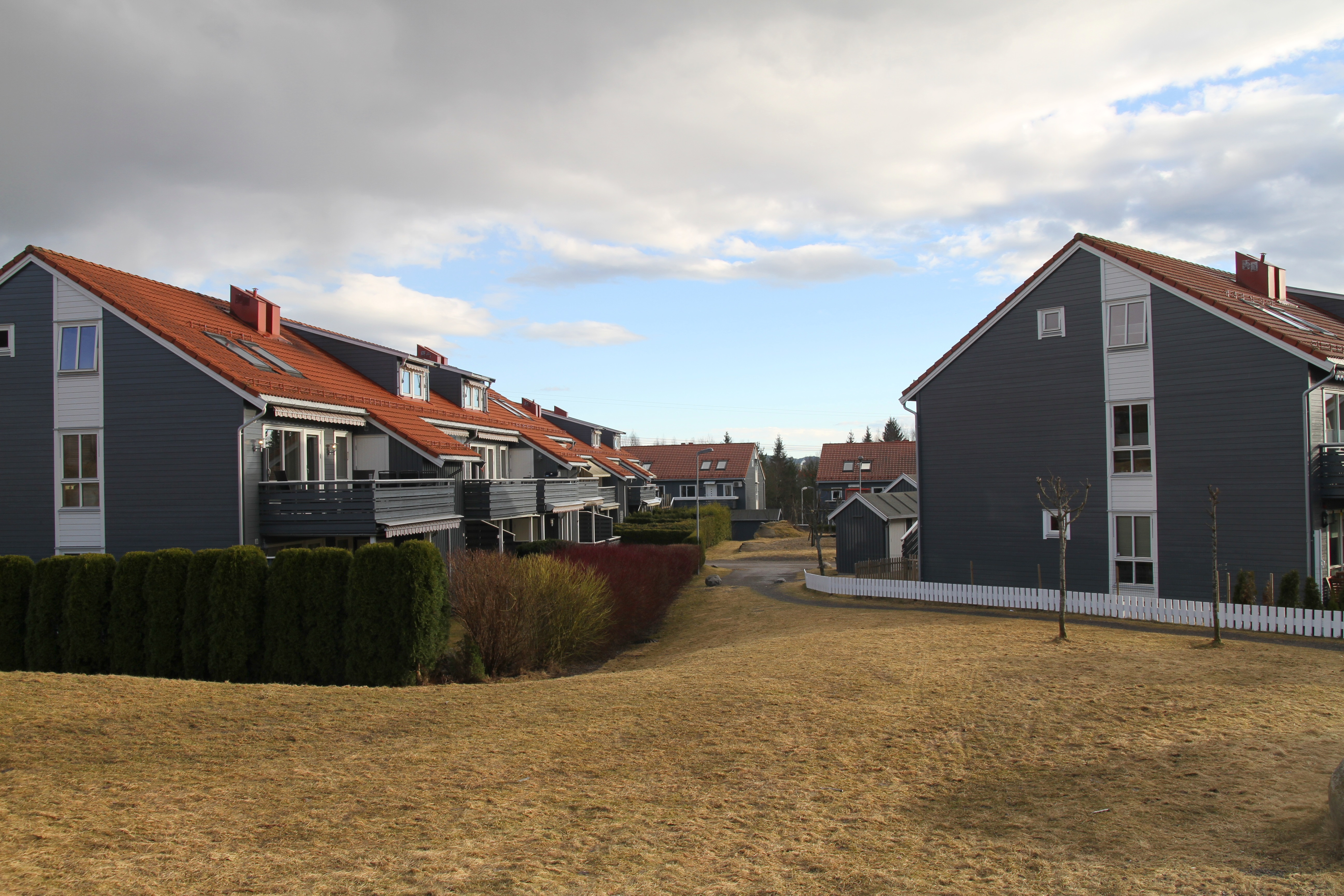 Idas vei. Bydel Stovner i Oslo.